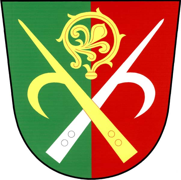 Znak obce Malá Roudka